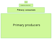 piramide